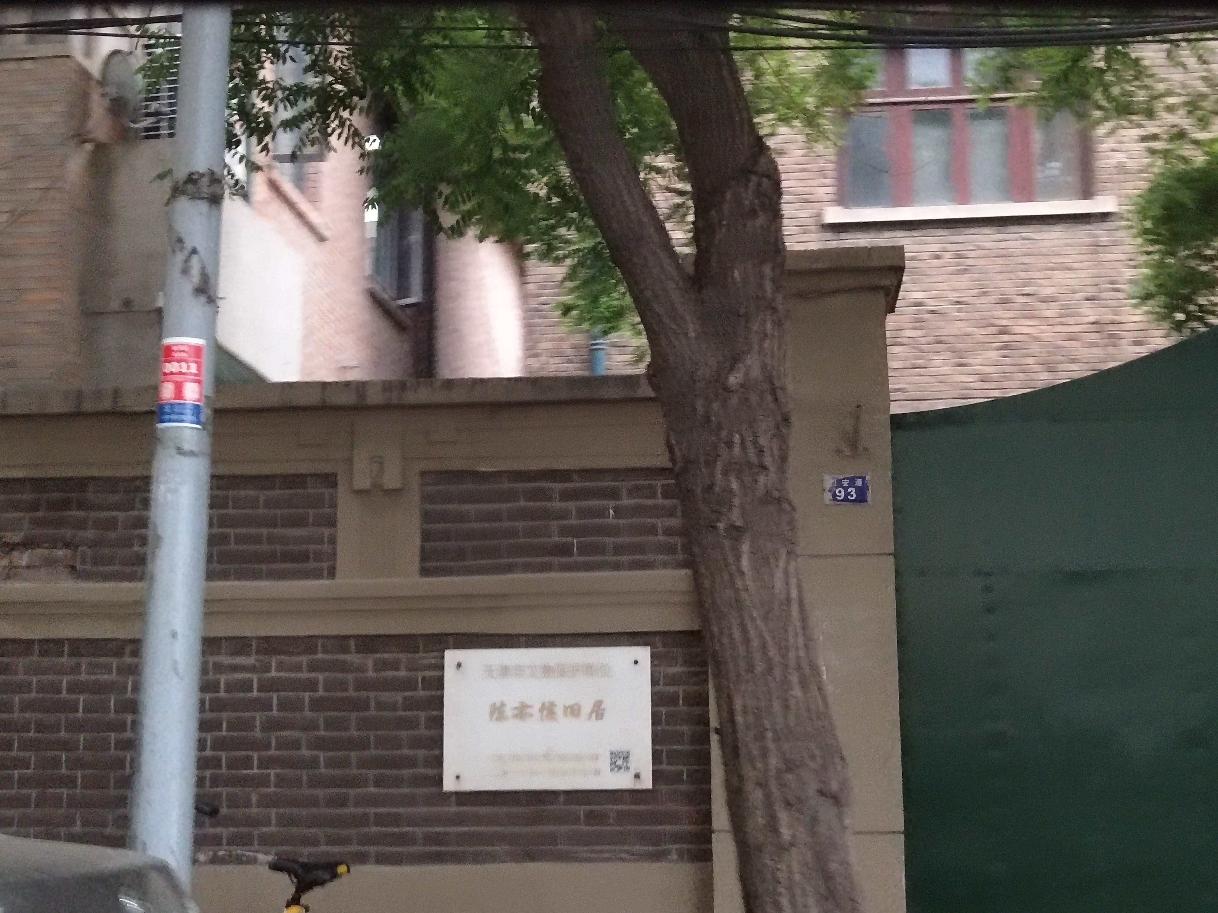 2020年5月21日拍摄的陈亦侯旧居近景，该建筑位于天津市和平区西安道93号。